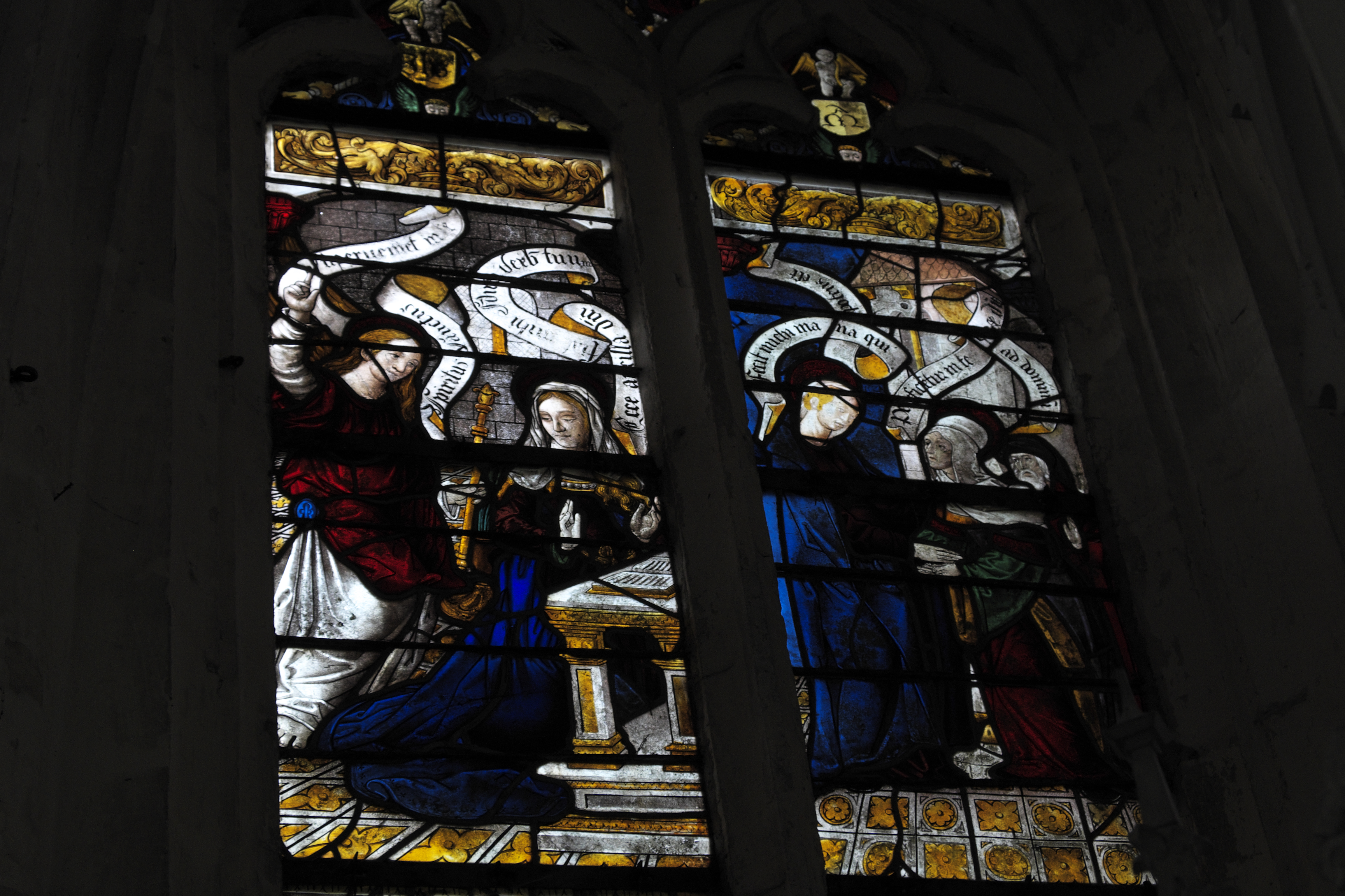 Katholische Kirche Notre-Dame-en-sa-Nativité in Puellemontier im Département Haute-Marne (Champagne-Ardenne/Frankreich), Bleiglasfenster von 1527; Darstellung: Geburt Marias (links unten), Präsentation Jesu im Tempel (rechts unten); Ausschnitt: Verkündigung (links oben), Heimsuchung (rechts oben) .